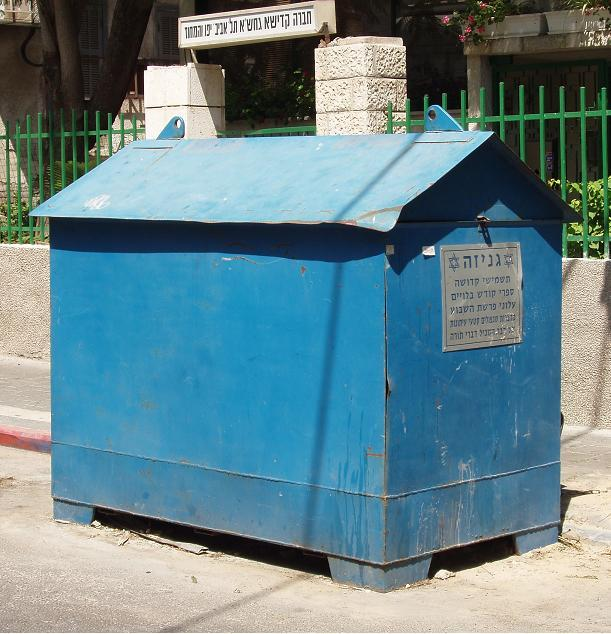 גניזה. צילם דוד שי